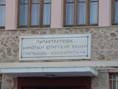 Πινακίδα της σχολής